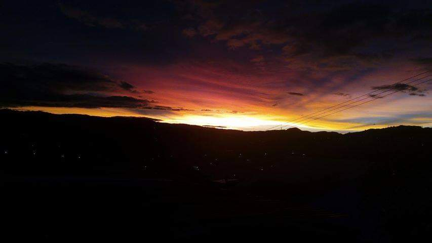 Atardecer en San Fernando, Chiapas